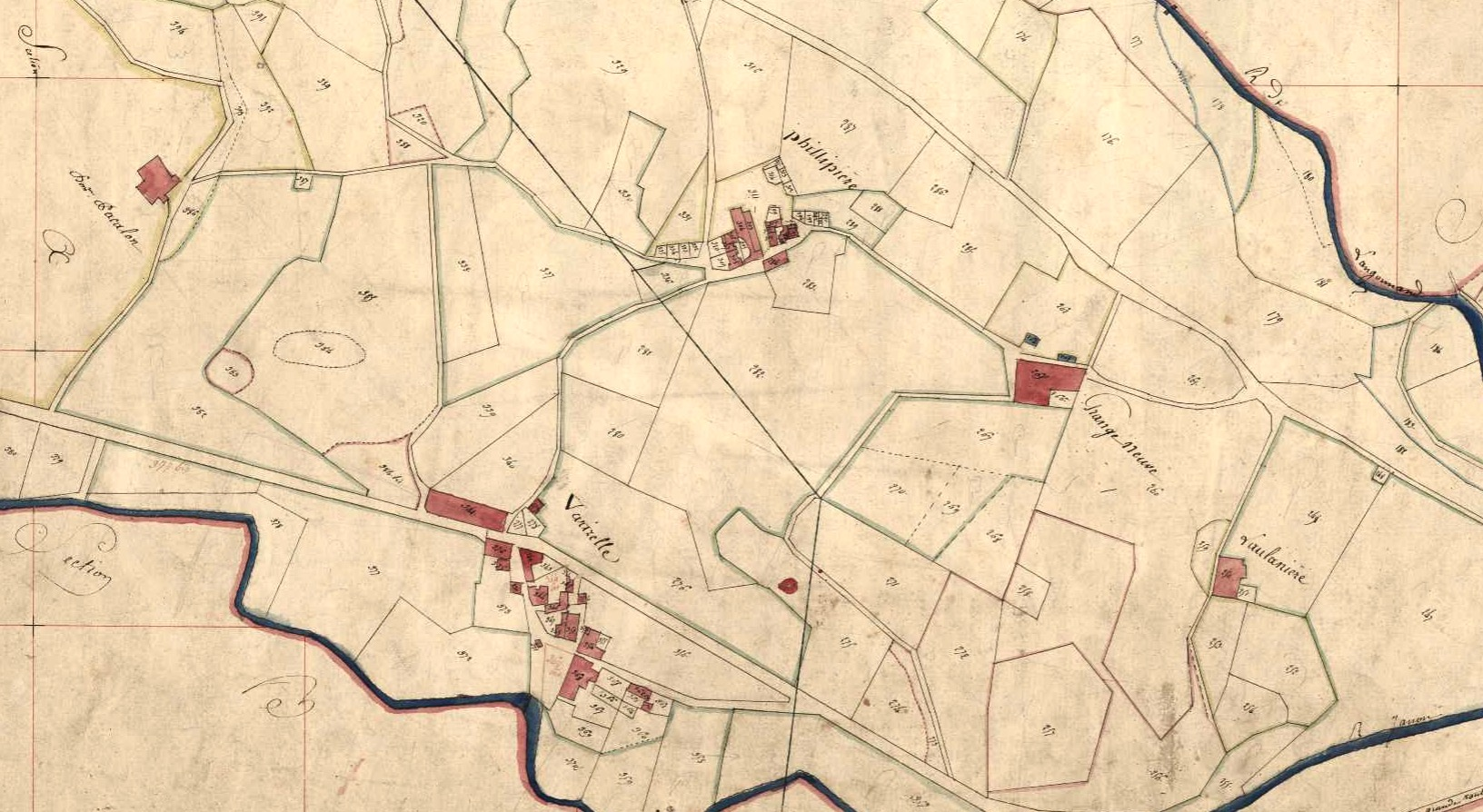 Extrait du cadastre napoléonien de 1812, commune d'Izieux (auj. Saint-Chamond, Loire) ; Section A 2 (Sorlière et La Varizelle) : plan levé par Blanc le jeune à l'échelle 1:2500.